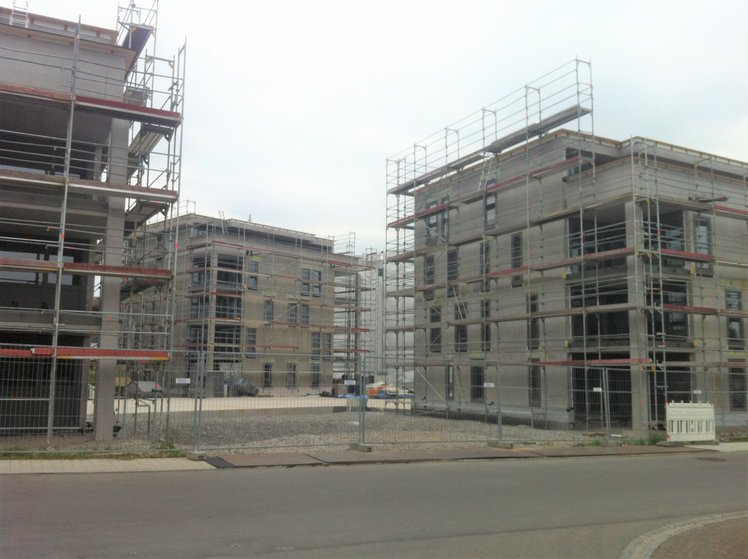 Küssaberg, Gemeinde im Landkreis Waldshut in Baden-Württemberg. Kadelburg: Wohnblöcke im Gewann „Neunschwanz“.